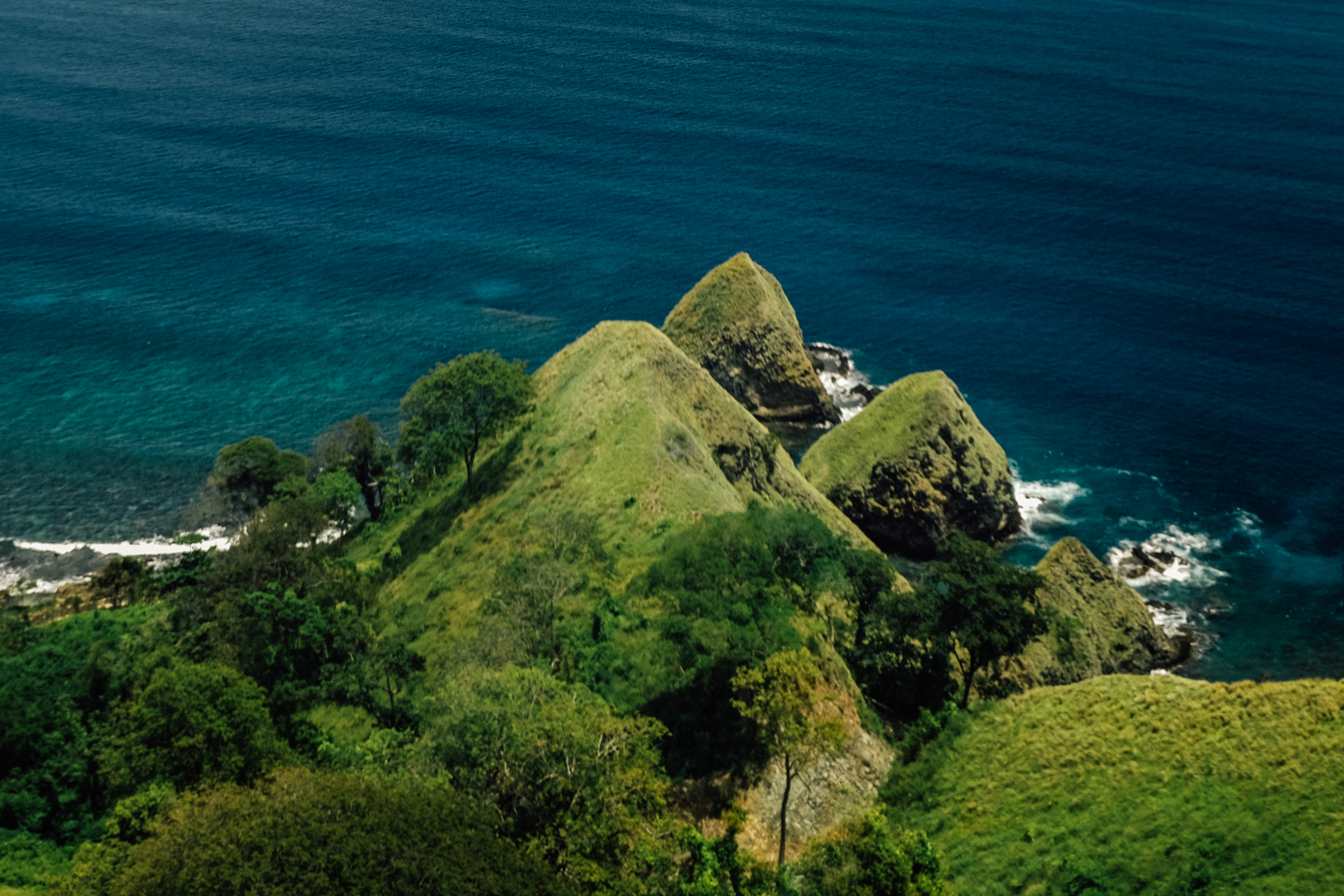 Bukit Batu Simpang berada di Kecamatan Balantak Kabupaten Luwuk